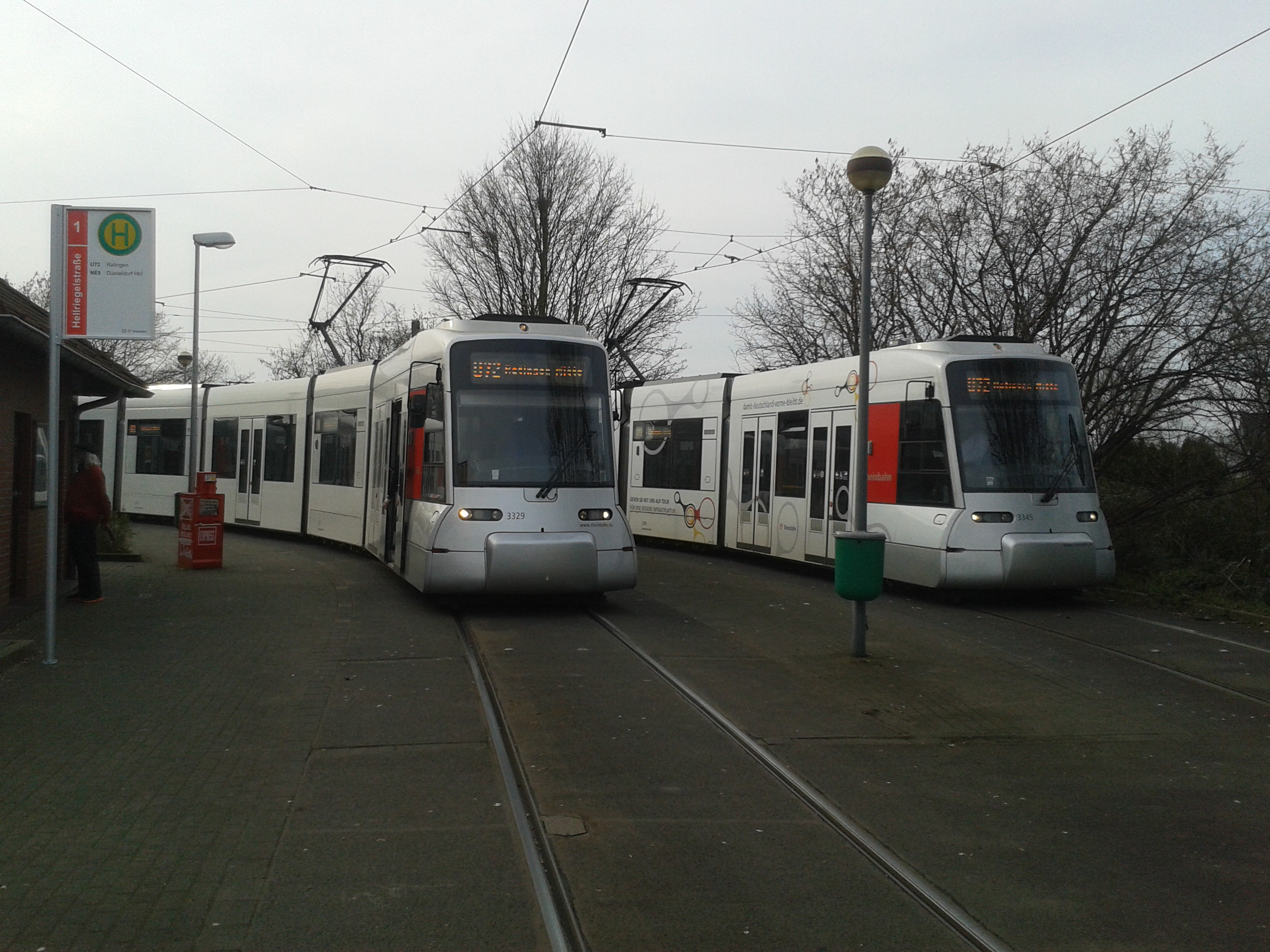 Zwei NF8U-Doppel auf der Linie U72